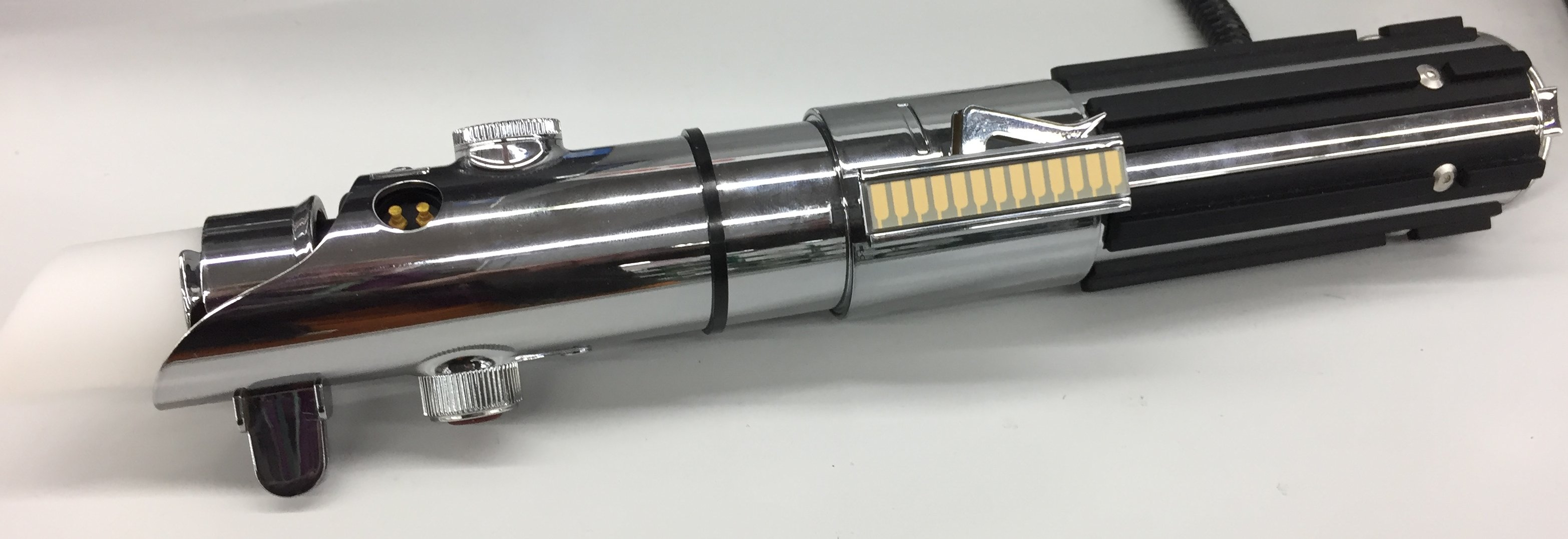 Lichtschwert (Virtual Reality Hardware)